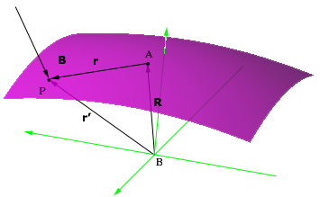 bild på moment